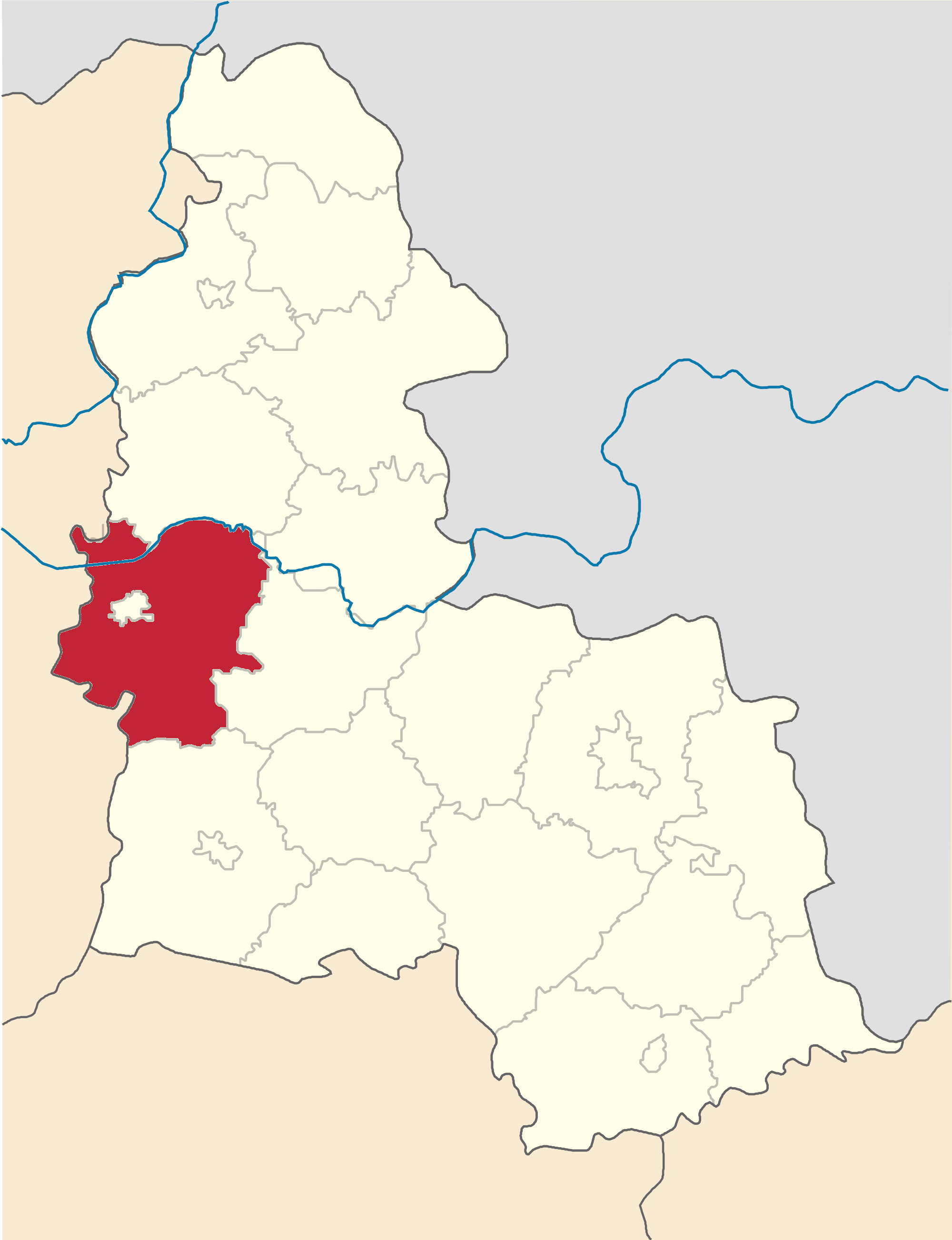 Konotopskyi-Raion map